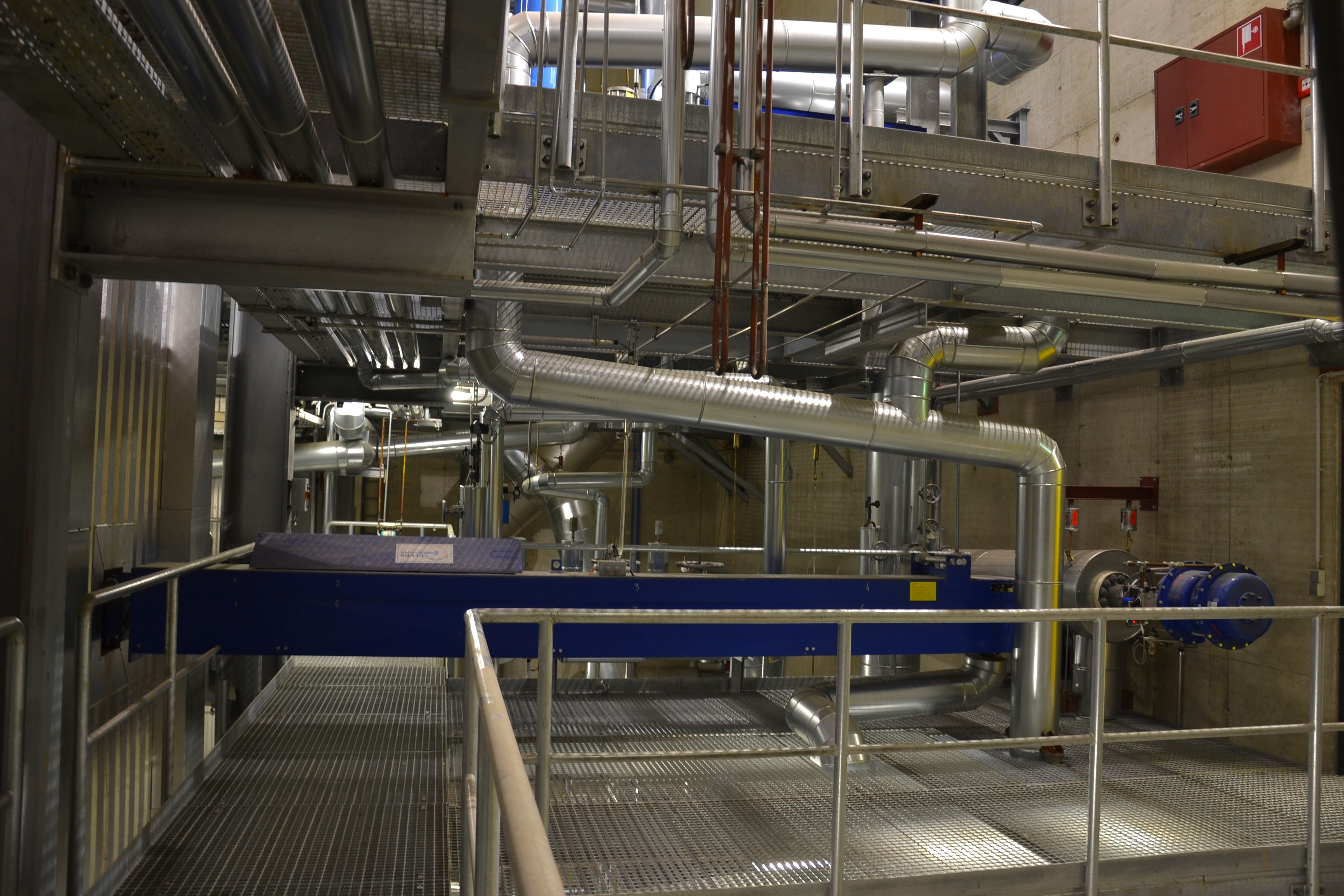 Russbläser eines Wasserrohrkessels der mit Biomasse befeuert mit max. 108 bar und 545°C betrieben wird.